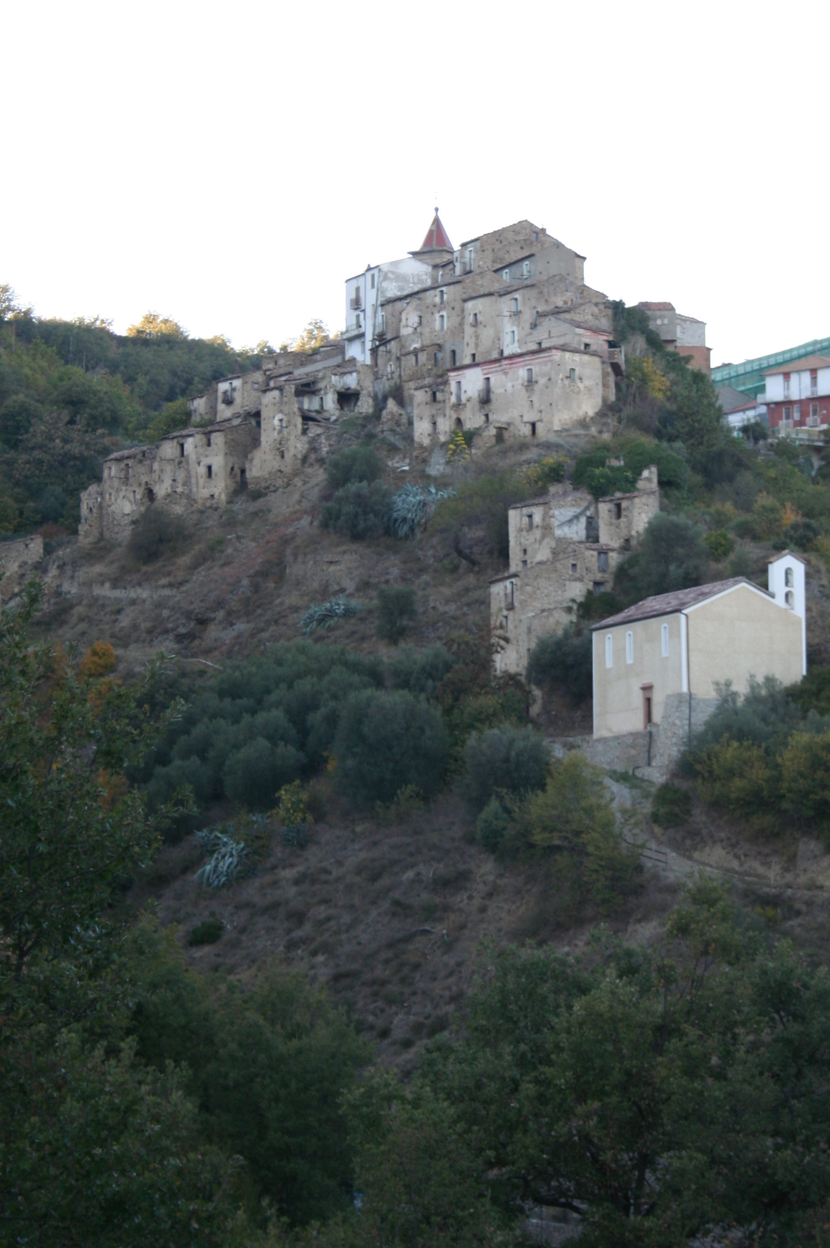 (C) Michele "O-Zone" Pinassi - Veduta di Gallicchio vecchio